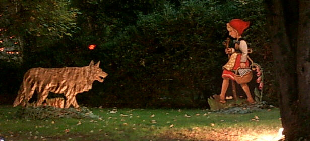 Enzuferillumination in Bad Wildbad: Rotkäppchen, selbst fotografiert, 2004